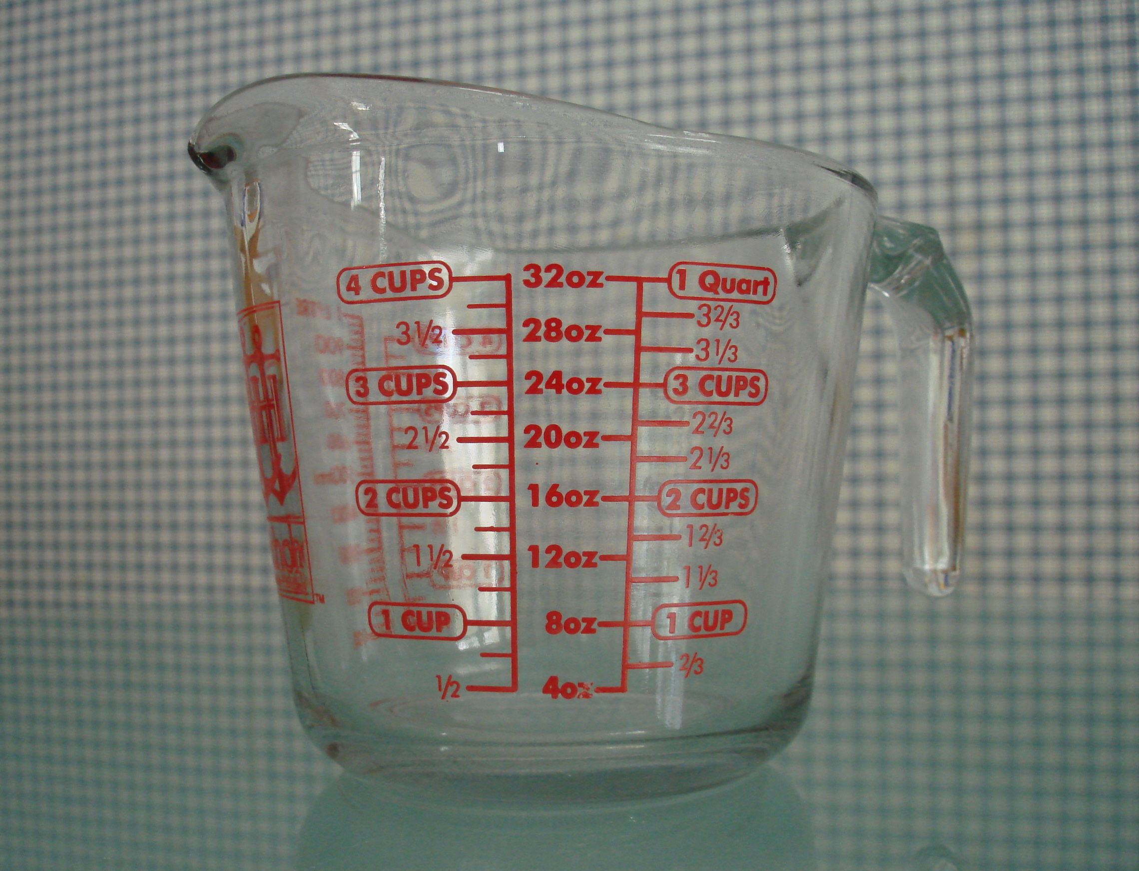 Measuring jar, glass